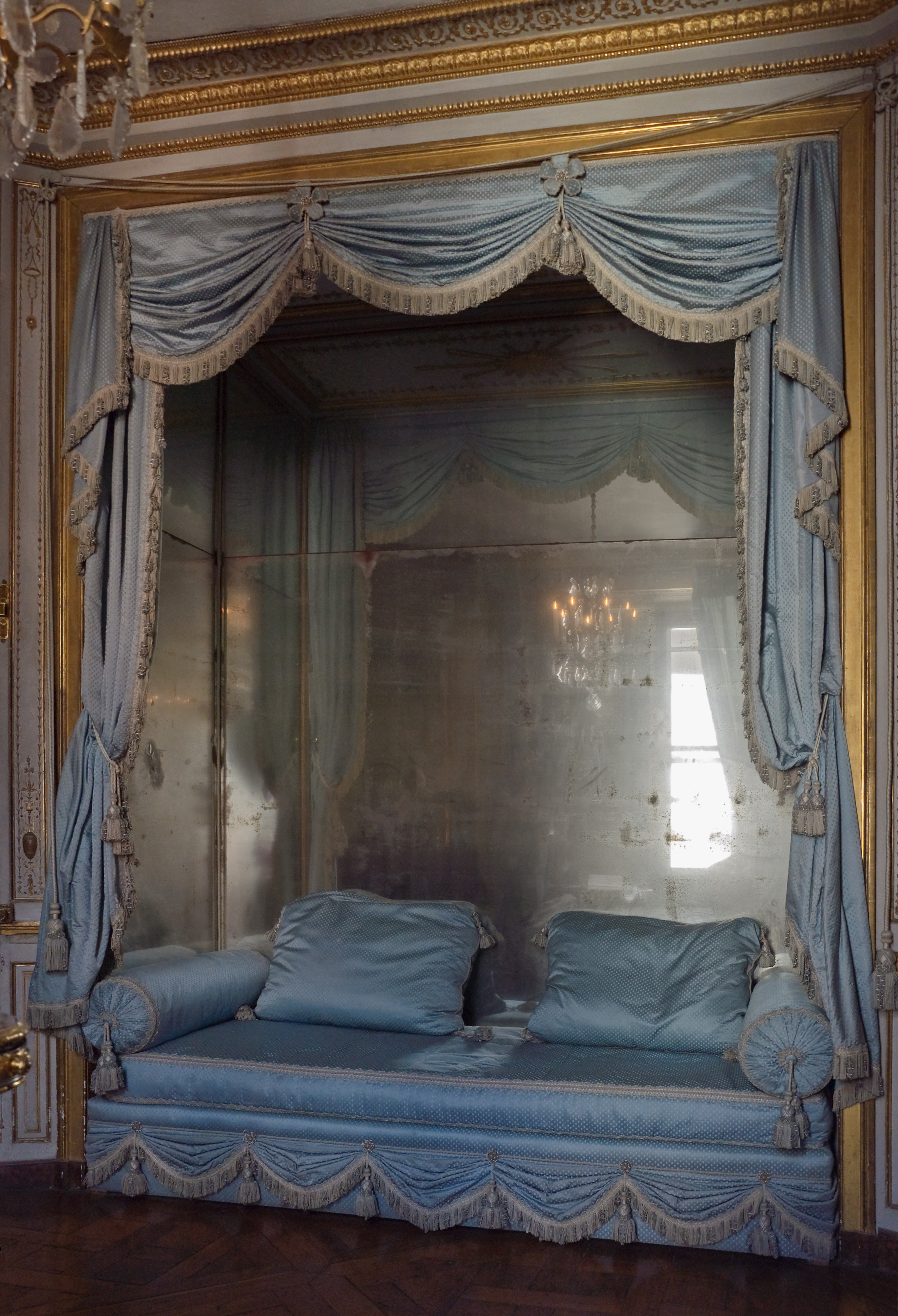 Château de Versailles - Petit appartement de la Reine - Le sofa du Cabinet de la Méridienne, dans sa niche de miroirs. Restitution de l'étoffe originelle : une grenadine bleue, soierie satinée à relief de points, retissée d'après le modèle original et correspondant au premier état livré en 1781, que Marie-Antoinette fit par la suite remplacer.